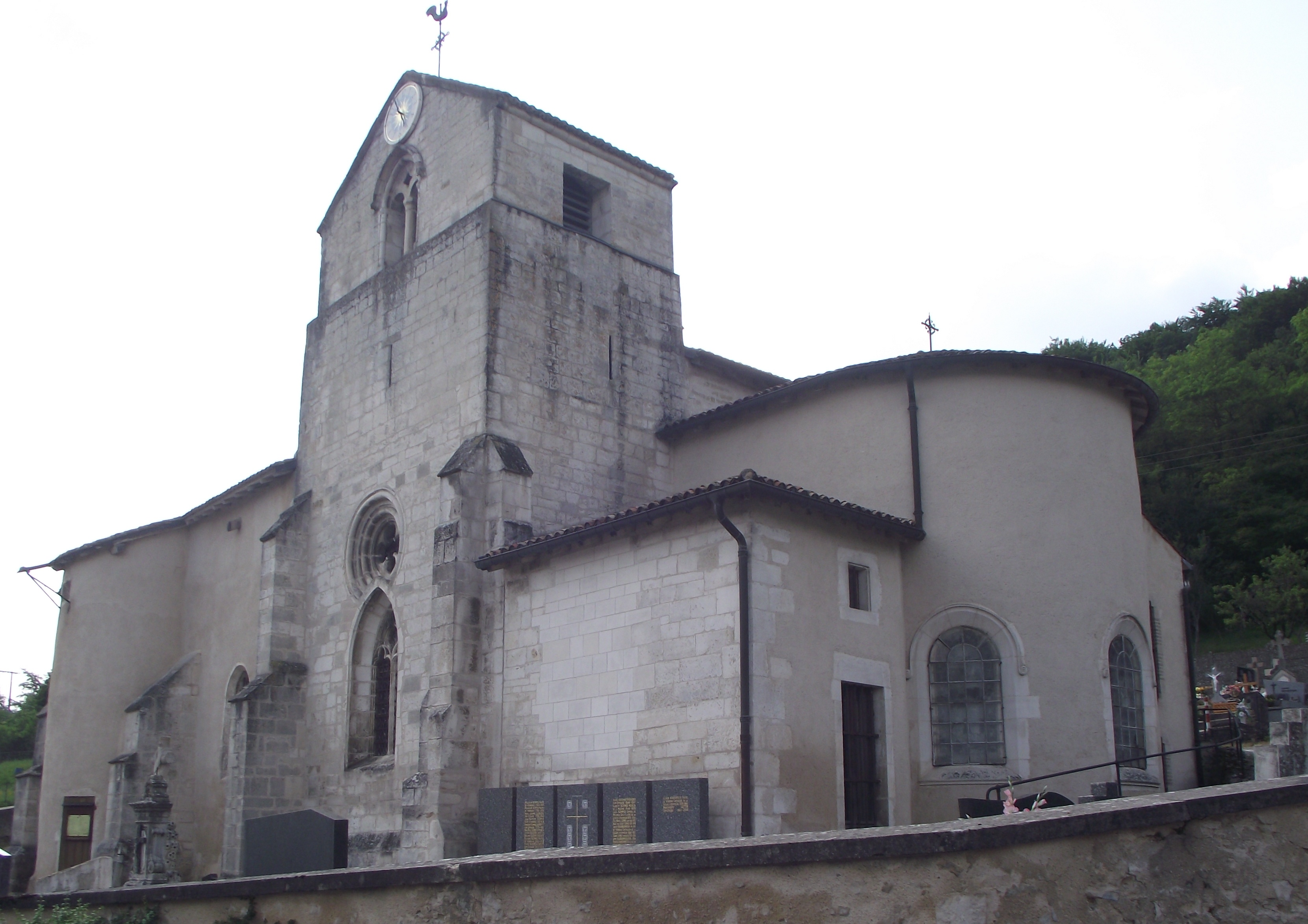 Église Saint-Pierre-et-Saint-Paul de Allamps